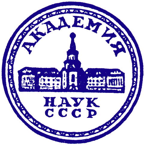 Логотип АН СССР